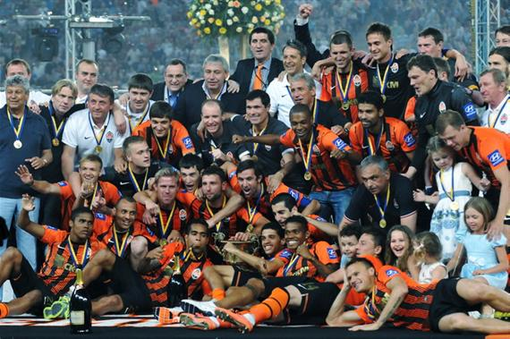 ФК Шахтар святкує чемпіонство у сезоні 2012-13